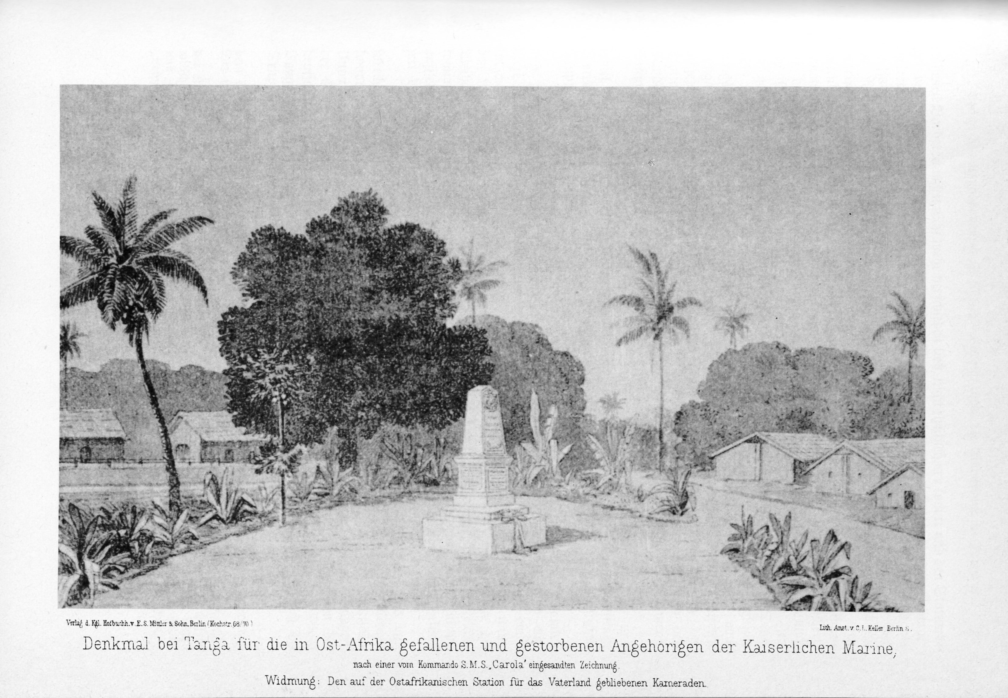 Denkmal für die in Ostafrika gefallenen Angehörigen der Kaiserlichen Marine in Tanga. Entwurf Professor Ed. Lührsen. Eingeweiht am 9. Oktober 1890 durch SMS CAROLA. Zeichnung durch Kommando SMS CAROLA